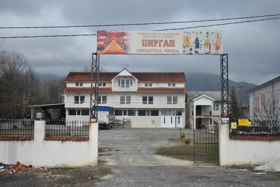 Винарска визба ПИРГАН